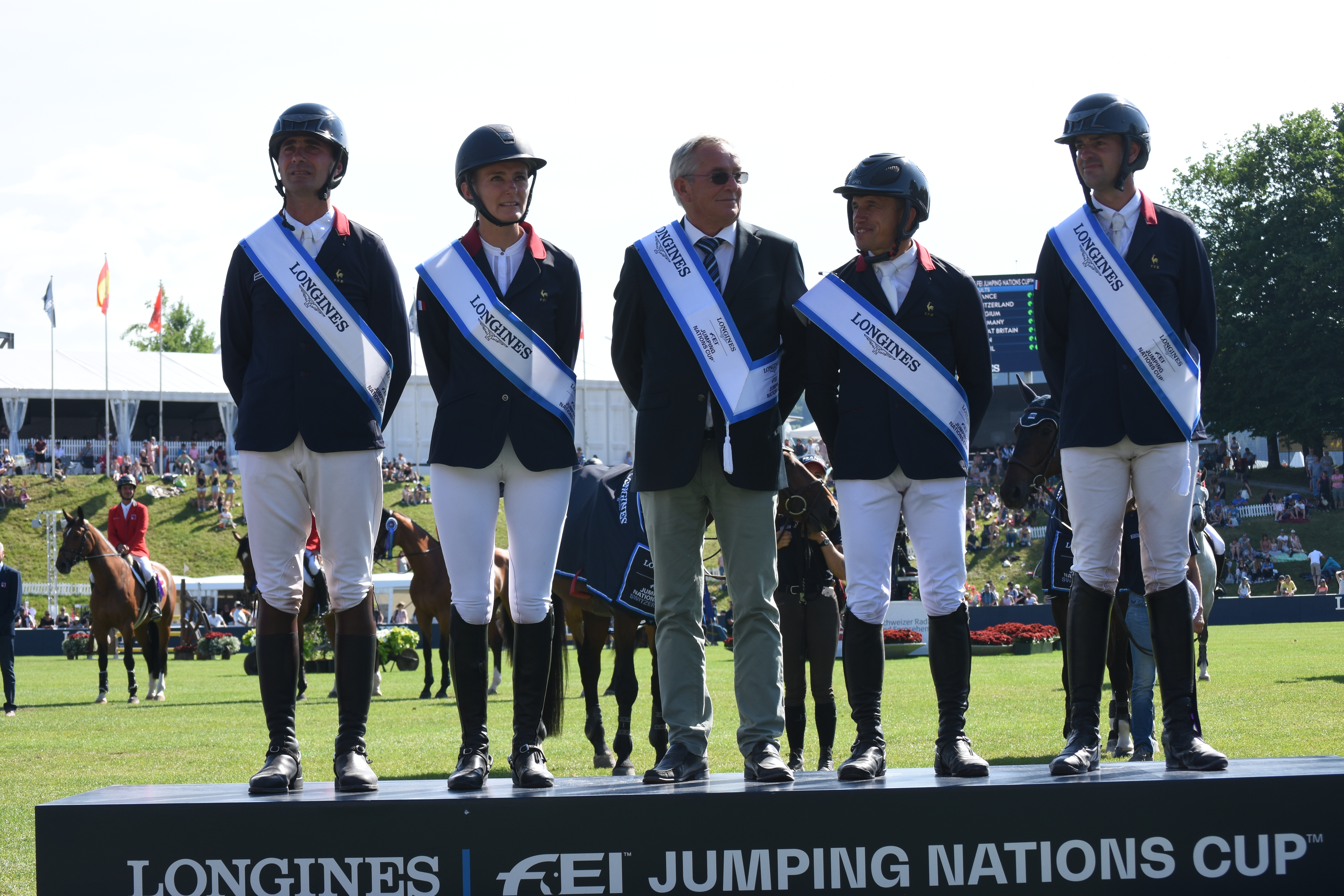 Siegerequippe Frankreich am Nationenpreis des CSIO St. Gallen 2018. Von links nach rechts: Nicolas Delmotte, Alexandra Francart, Philippe Guerdat (Equippenchef), Olivier Robert, Mathieu Billot